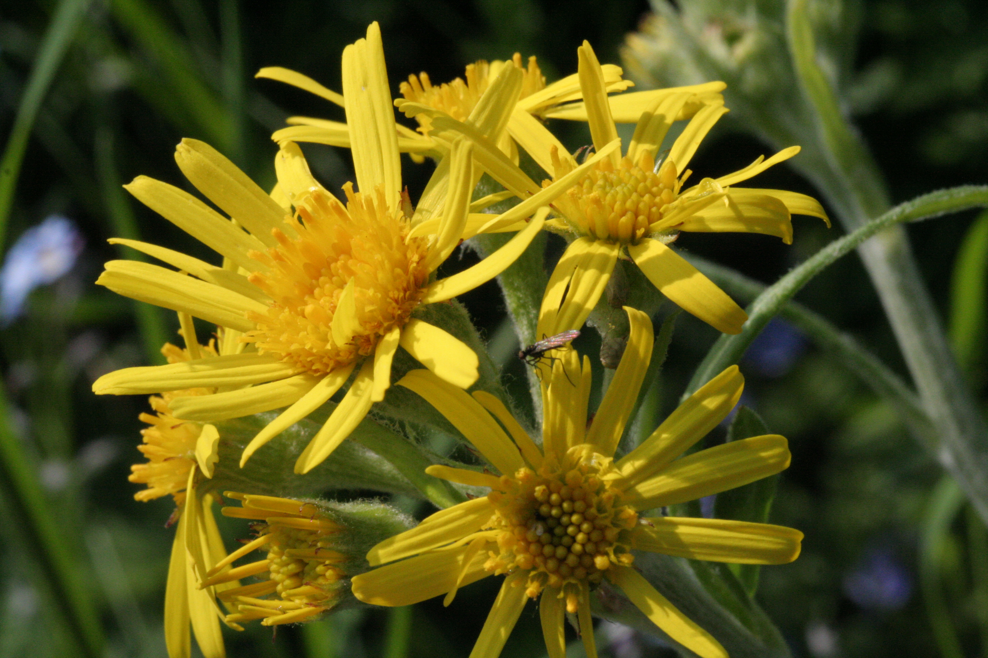 Senecione a foglie lunghe - Località: Giardino Botanico Alpino "Giangio Lorenzoni", Pian Cansiglio, Tambre d'Alpago (BL), 1000 m s.l.m.